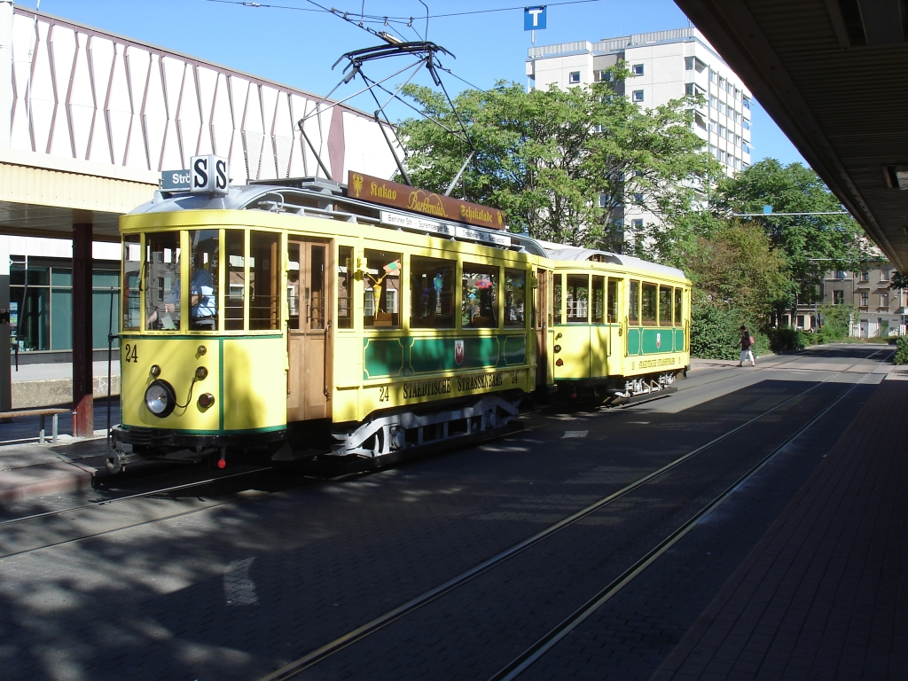 Tram in Cottbus, Brandenburg, Germany